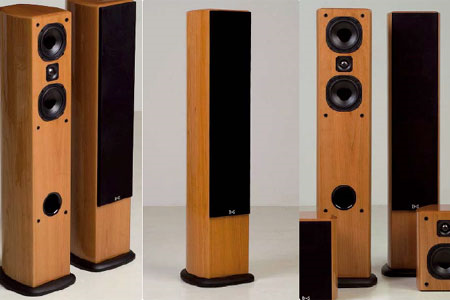 De hele MD lijn.